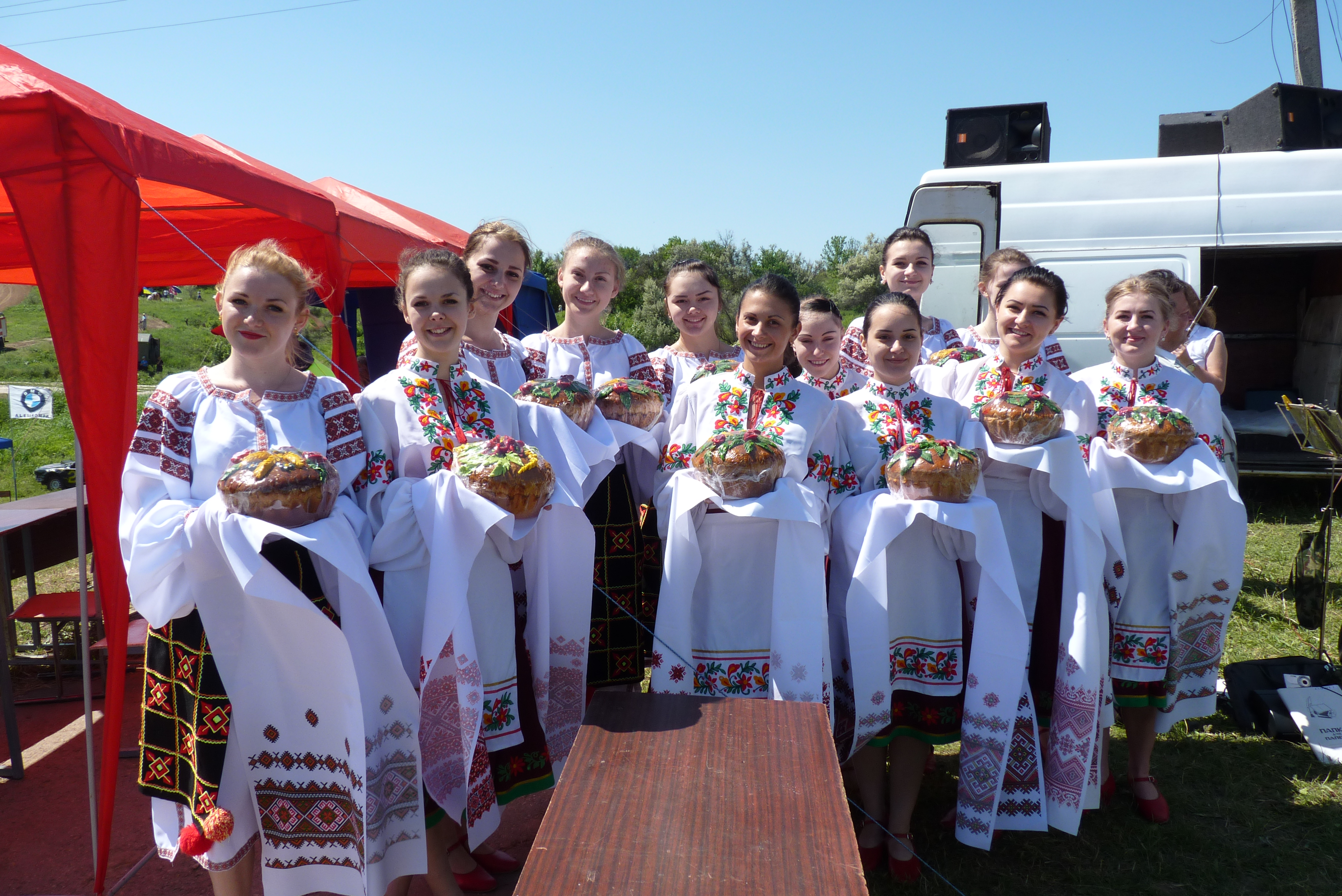 Відкриття змаганнь в Олександрії. 6 червня 2015 року